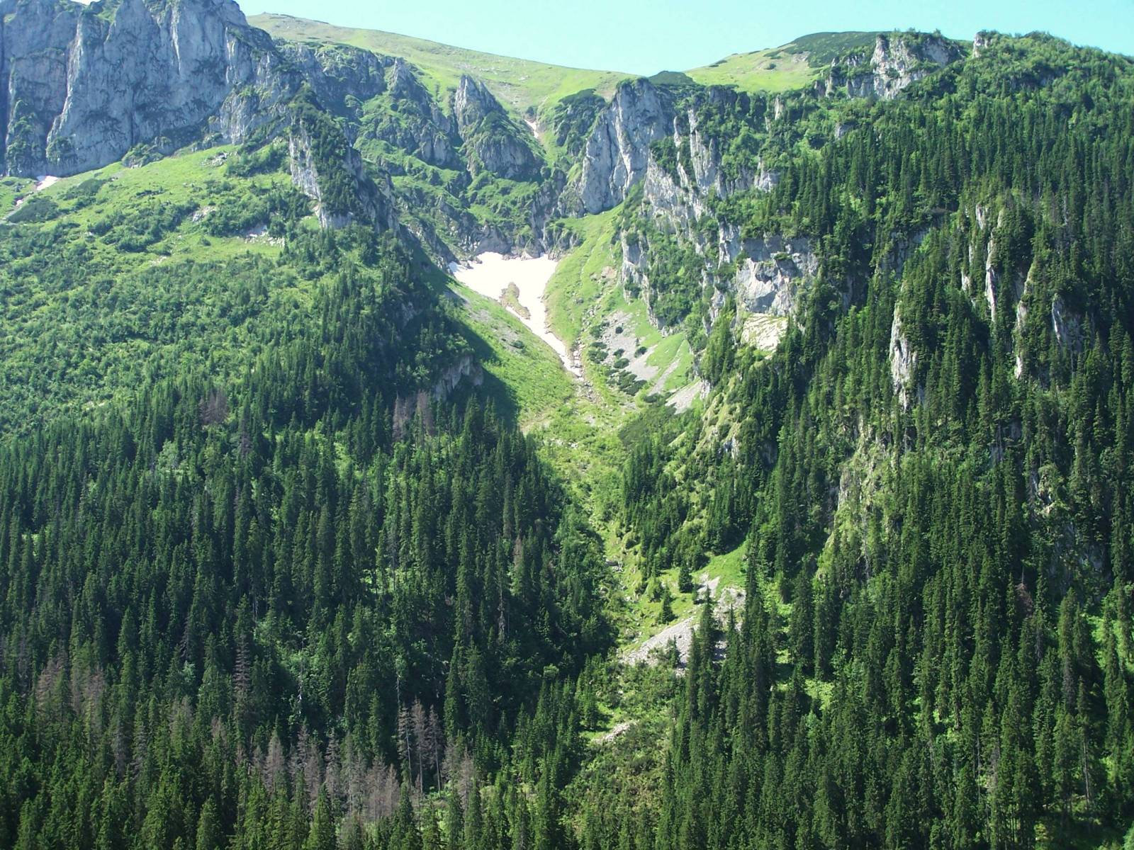 Mała Świstówka (Tatra Mountains - Dolina Miętusia)